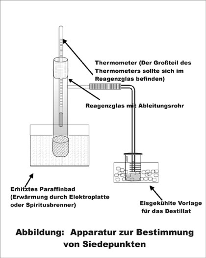 Siedepunktbestimmung